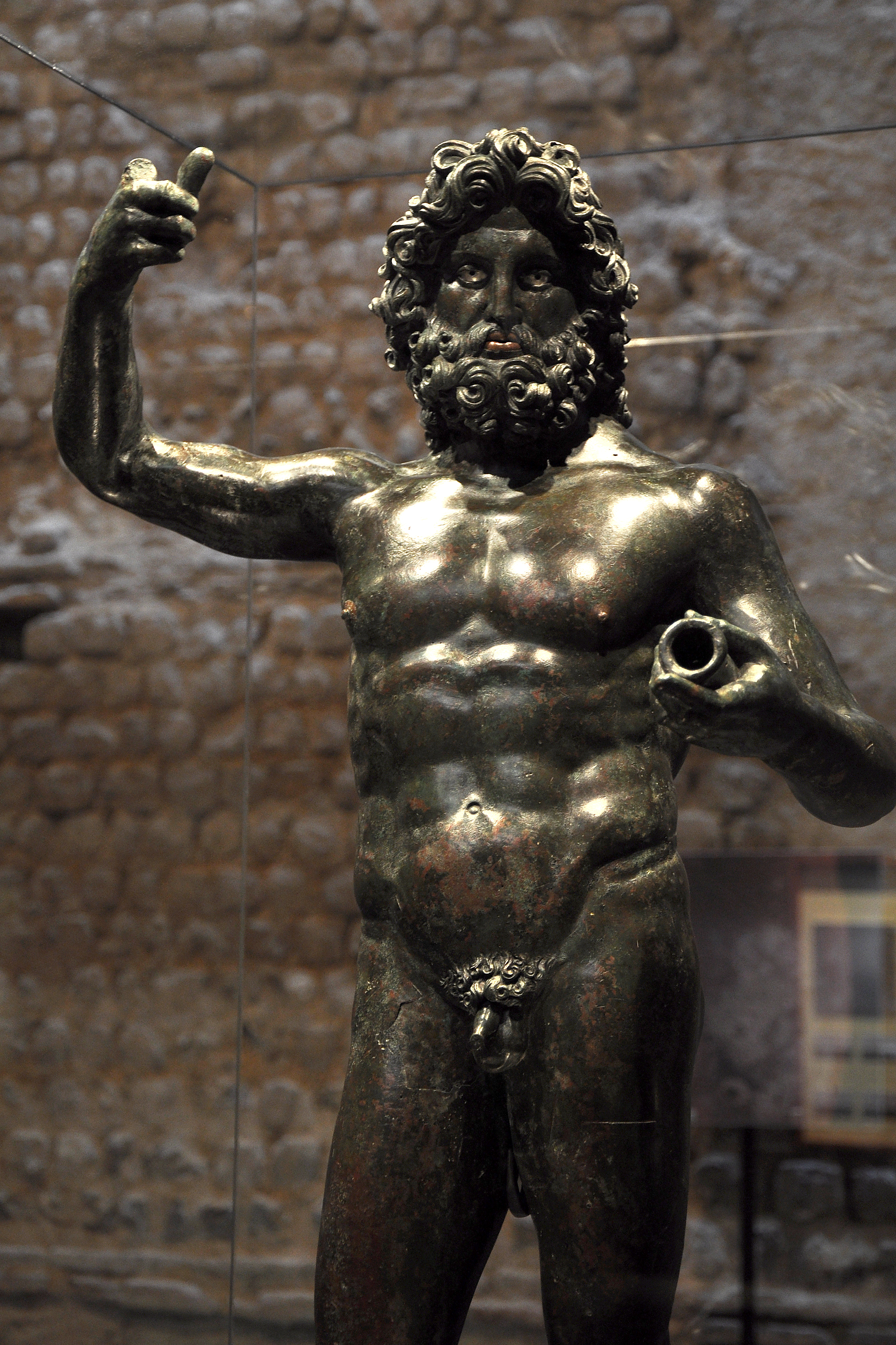 Statue de Jupiter (Jupiter Stator), trouvée au Vieil-Evreux en 1840, bronze, cuivre et argent, 2ème moitié du 1er siècle après JC. Musée d'Evreux.